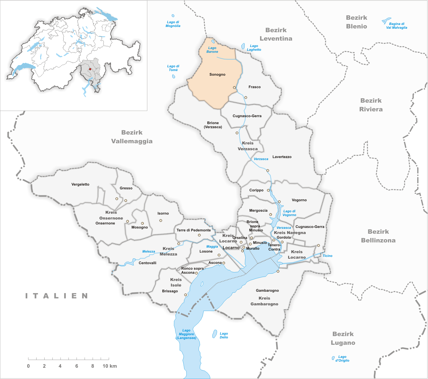 Municipality Sonogno